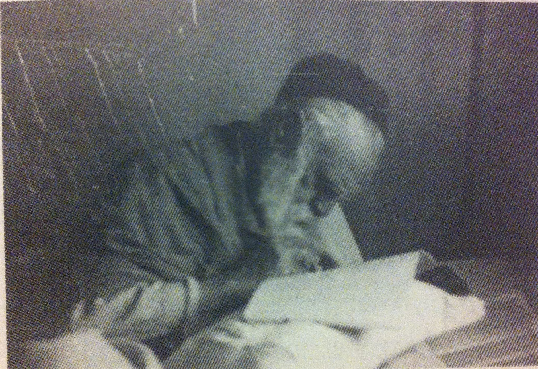 Messod Maarek, Jewish-Tunisian writer and journalist in judeo-arabic. 1930's.